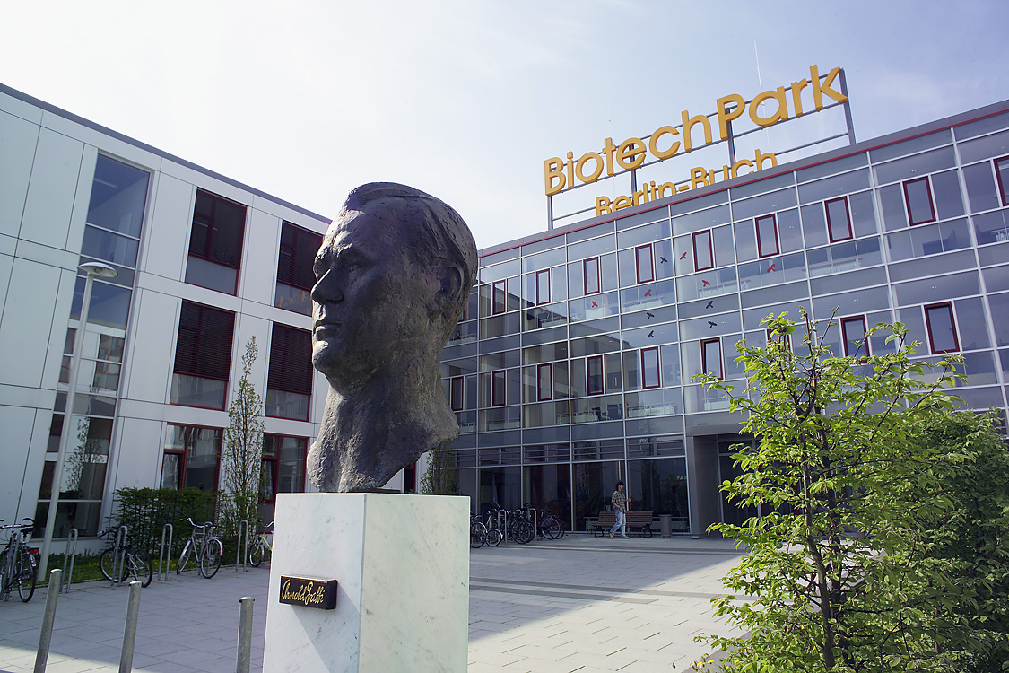 Gründern und Unternehmen bietet der BiotechPark Berlin-Buch auf rund 31.000 Quadratmetern branchenspezifische Labor- und Büroflächen mit modernster Ausstattung.